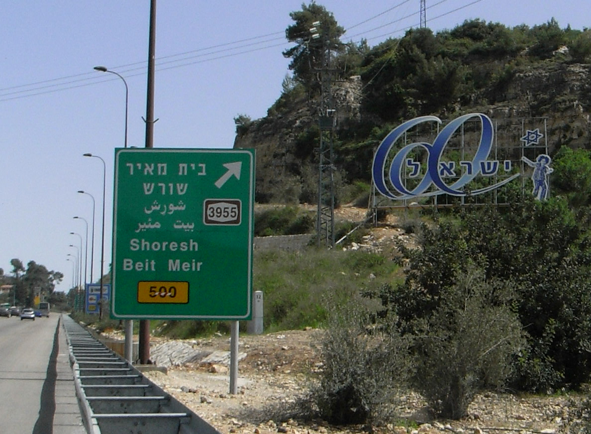 שלט לציון חגיגות ה- 60 בכביש 1, בדרך לירושלים.